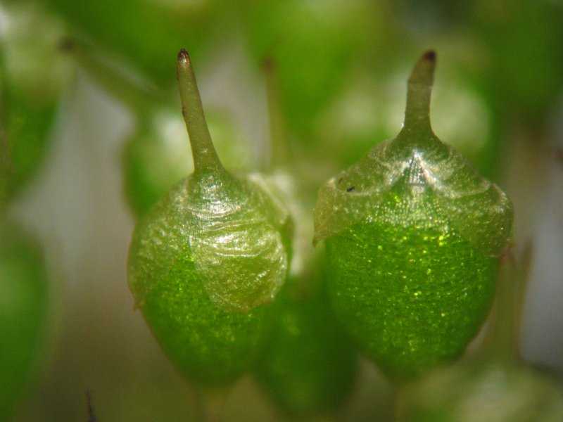 Birnförmiges Blasenmützenmoos (Physcomitrium pyriforme), Kalyptra und Kapsel, Vergrößerung: 30x